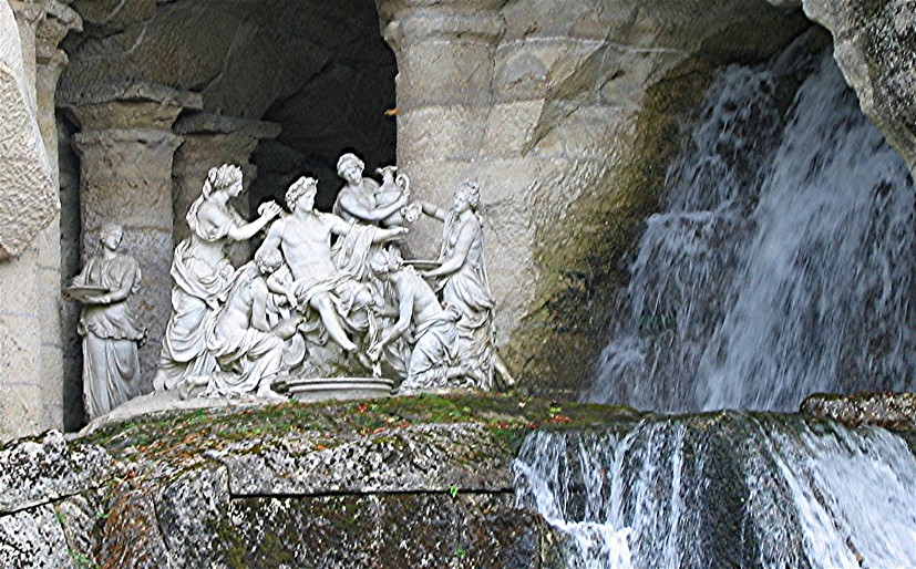 Guérin, Gaspard Marsy et Balthazar Marsy: Les chevaux du soleil (1664-1666), Bosquet des Bains d'Apollon dans les jardins de Versailles, France. Photographie personnelle, prise par l'Utilisateur Urban, septembre 2004, GFDL. Urban Septembre 2004 Catégorie:Image du parc de Versailles